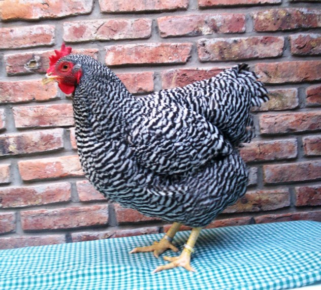 gallina bataraz barrada gruesa